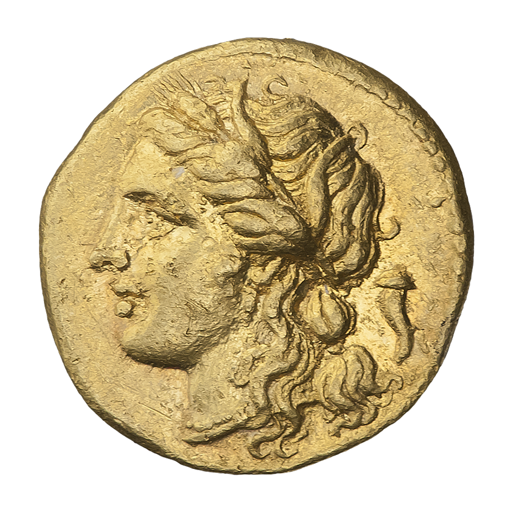 Сицилия. Сиракузы. Гиерон II (275—215 гг. до н.э.). Золотая драхма (декадрахма). Ок. 269—215 гг. до н.э. Аверс. Голова богини Персефоны в венке, влево; сзади рог изобилия. Точечный ободок.